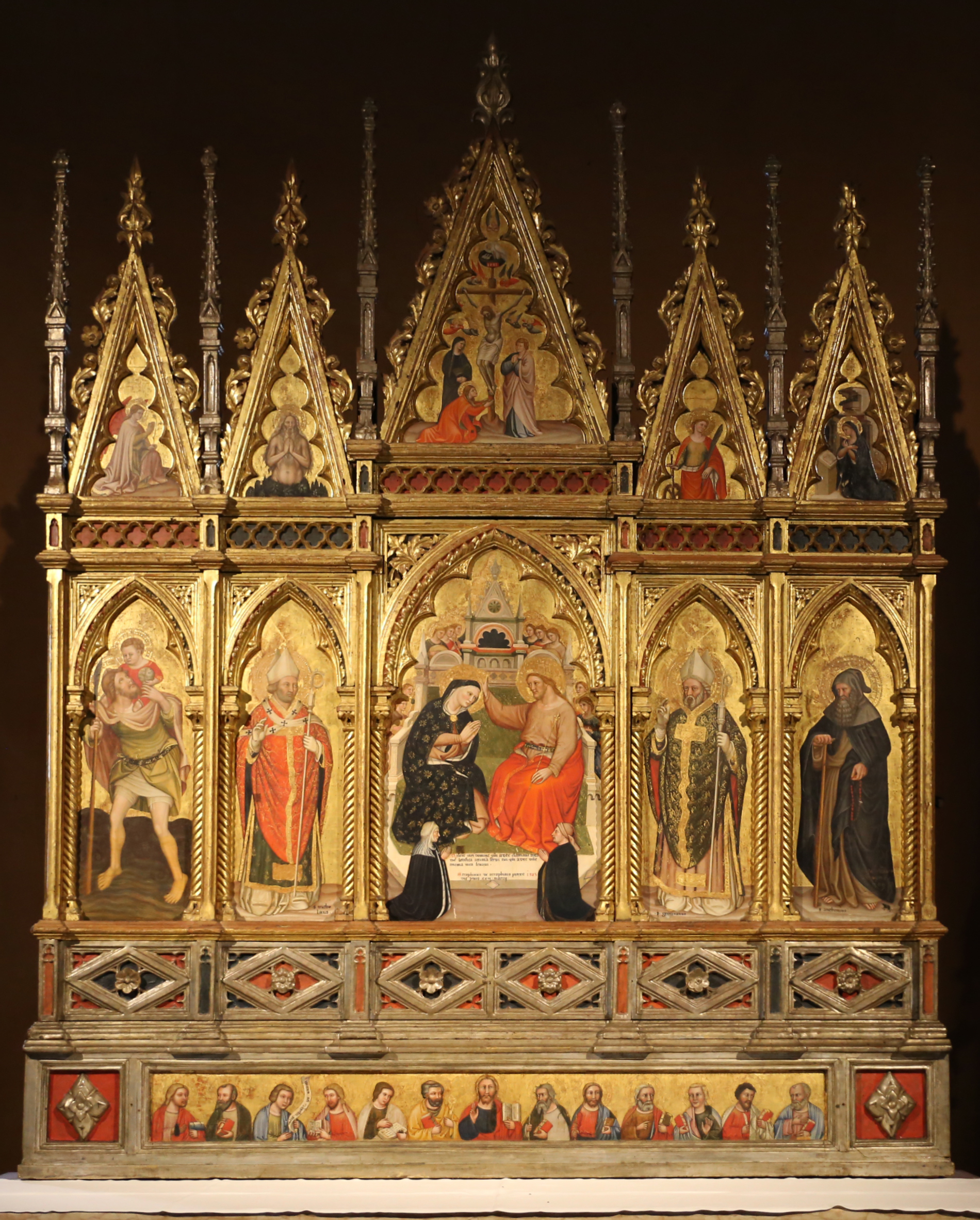 Piazza Grande (Modena) This is a photo of a monument which is part of cultural heritage of Italy.